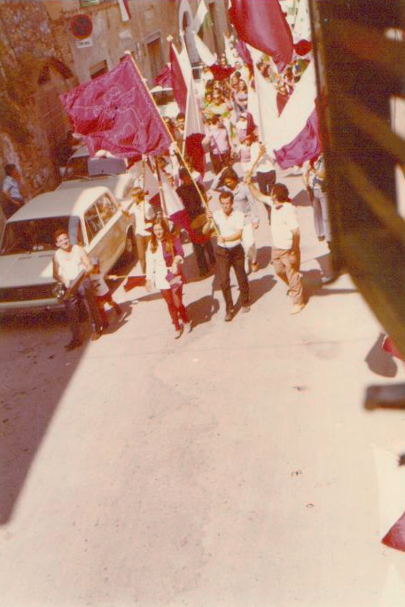 I festeggiamenti dei contradaioli del San Martino, la contrada vincitrice della prima edizione della Giostra di Simone, avvenuta nel 1972.